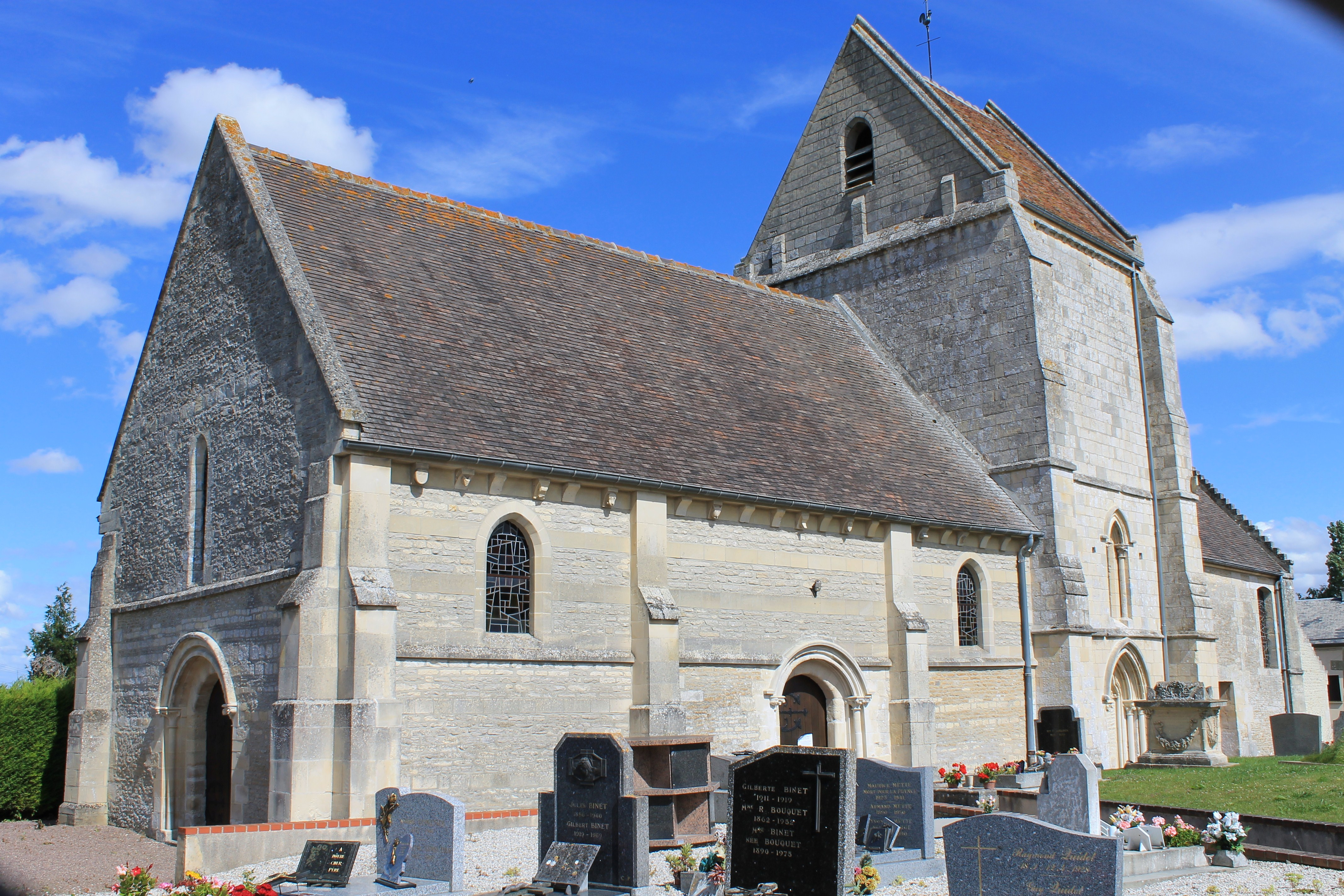 église Notre-Dame à Hubert-Folie (Calvados)